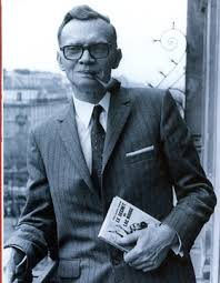 Ici, Paul Jacques Bonzon